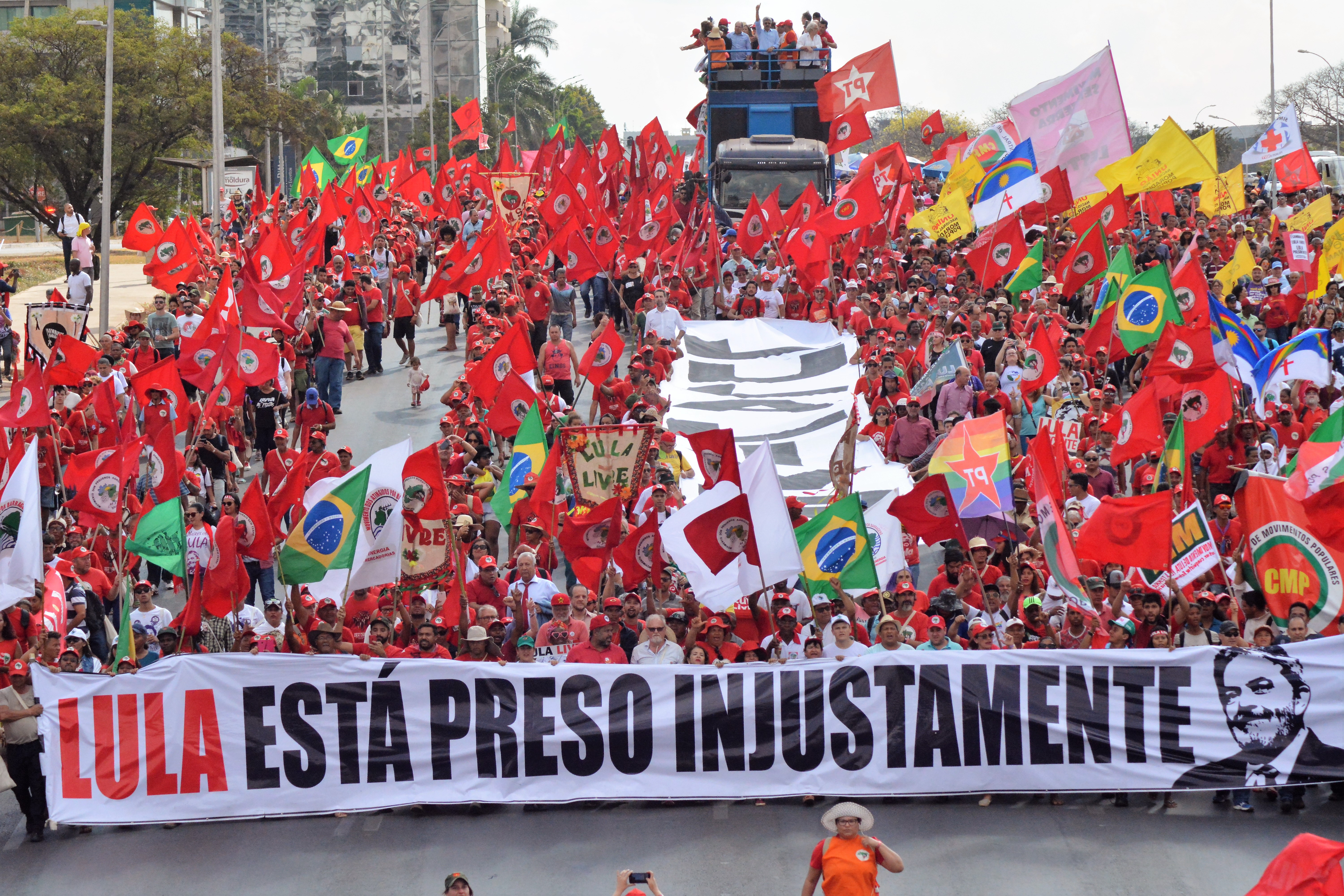 Fotografias da manifestação que acompanhou o registro da candidatura de Lula no Tribunal Superior Eleitoral, em Brasília.